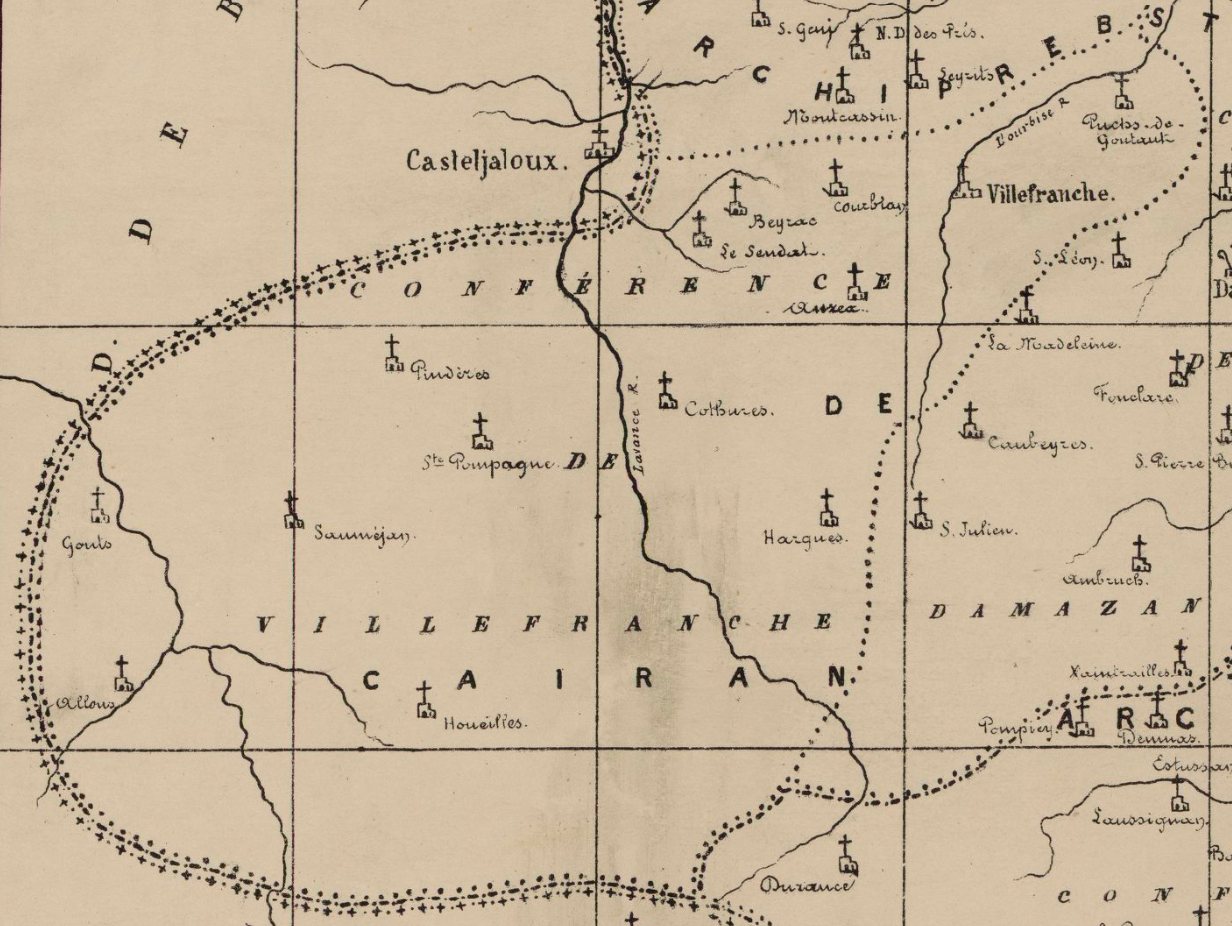 Extrèit de la mapa de la diocèsi de Condòm: Jean-Marie Cazauran (1845-1910). Diocèse de Condom au XVIIe siècle.